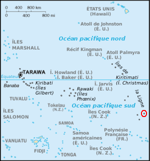 Carte de Kiribati avec l'Île Caroline entourée en rouge.